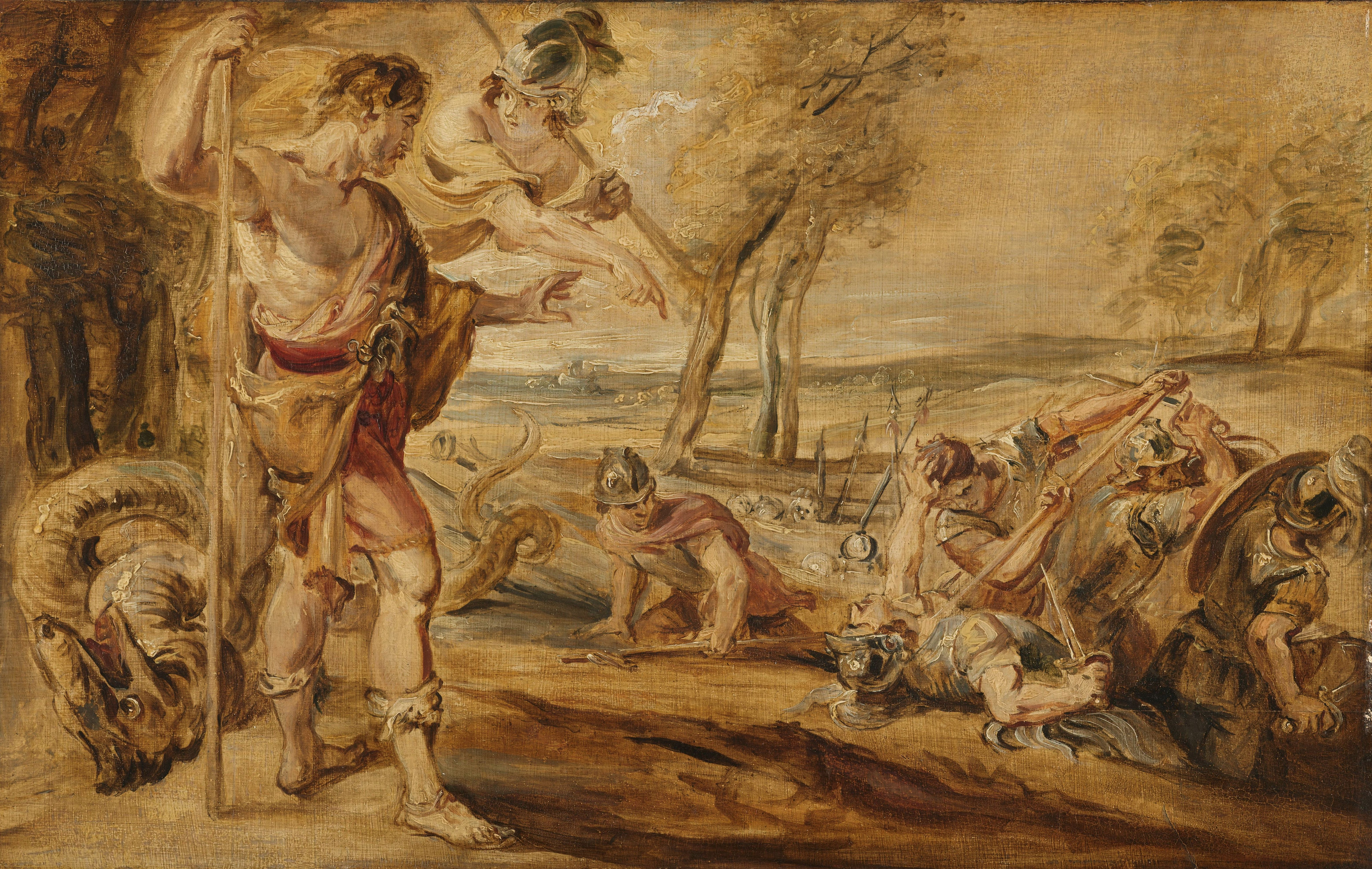 Cadmus zaait de drakentanden. In een landschap staat links Cadmus naast de gedode draak van Ares, boven hem zweeft Minerva. Rechts komen de krijgers uit de grond en bevechten elkaar.